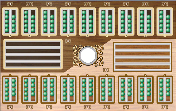 Начальная позиция в игре "тогуз коргоол".